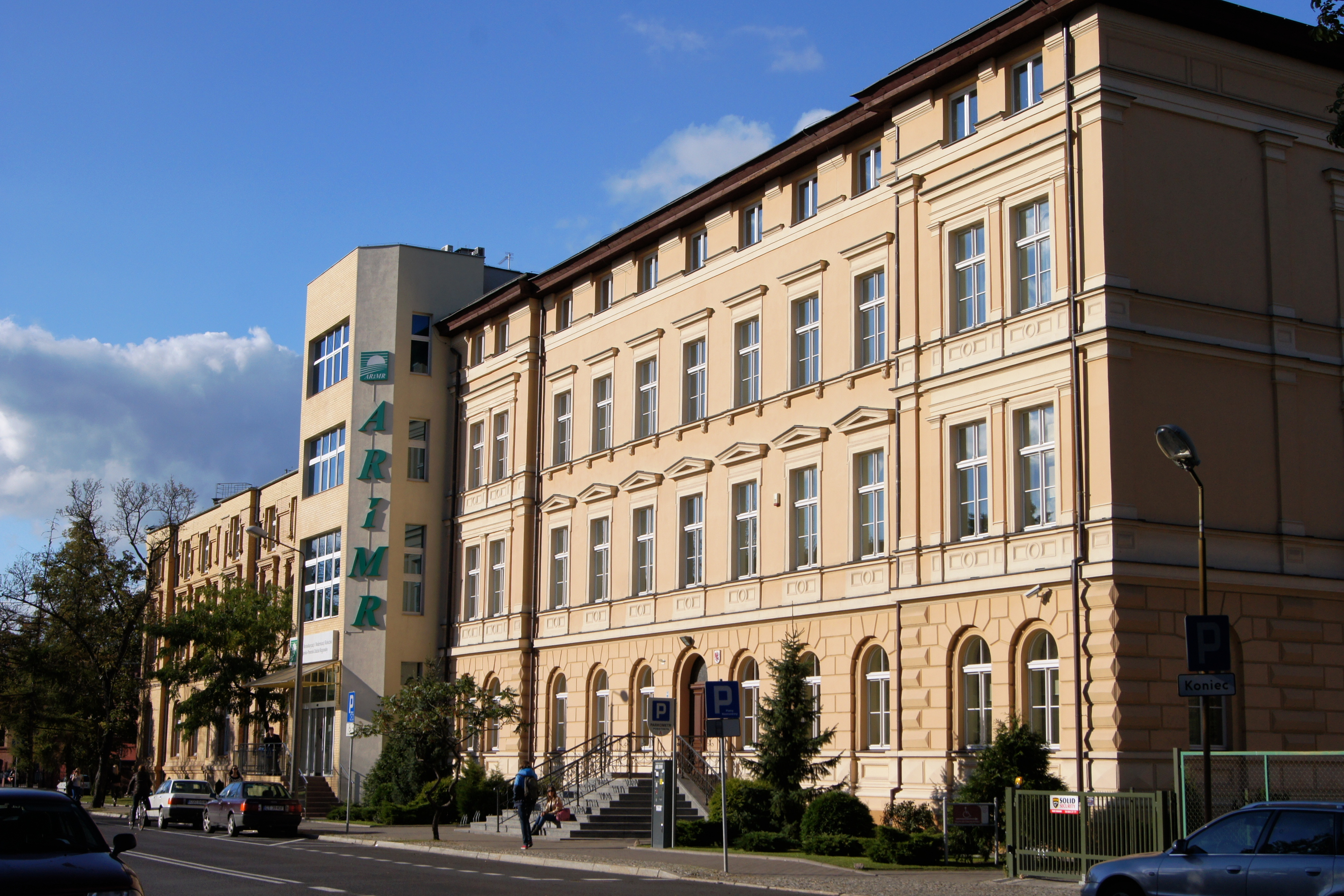 Toruń, ul. gen. J. Dąbrowskiego 4 - dawny szpital wojskowy, obecnie biblioteka, 1891-1896 (zabytek nr rejestr. A/178)